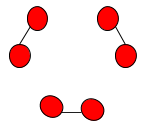 Grafo com nó central onde ocorreu falha.